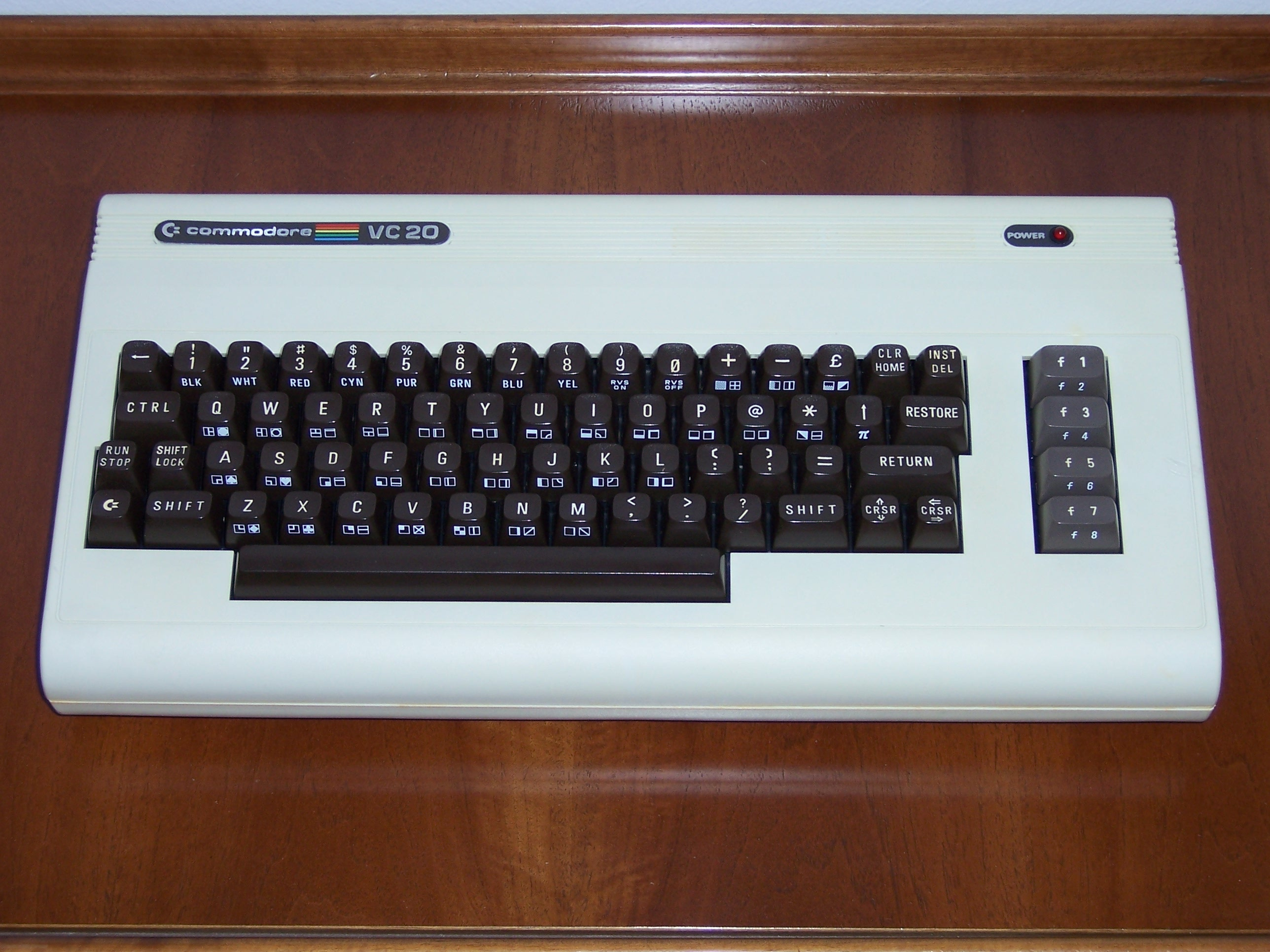 Autore: Matteo Caccia Fonte: collezione personale VC 20 seconda serie